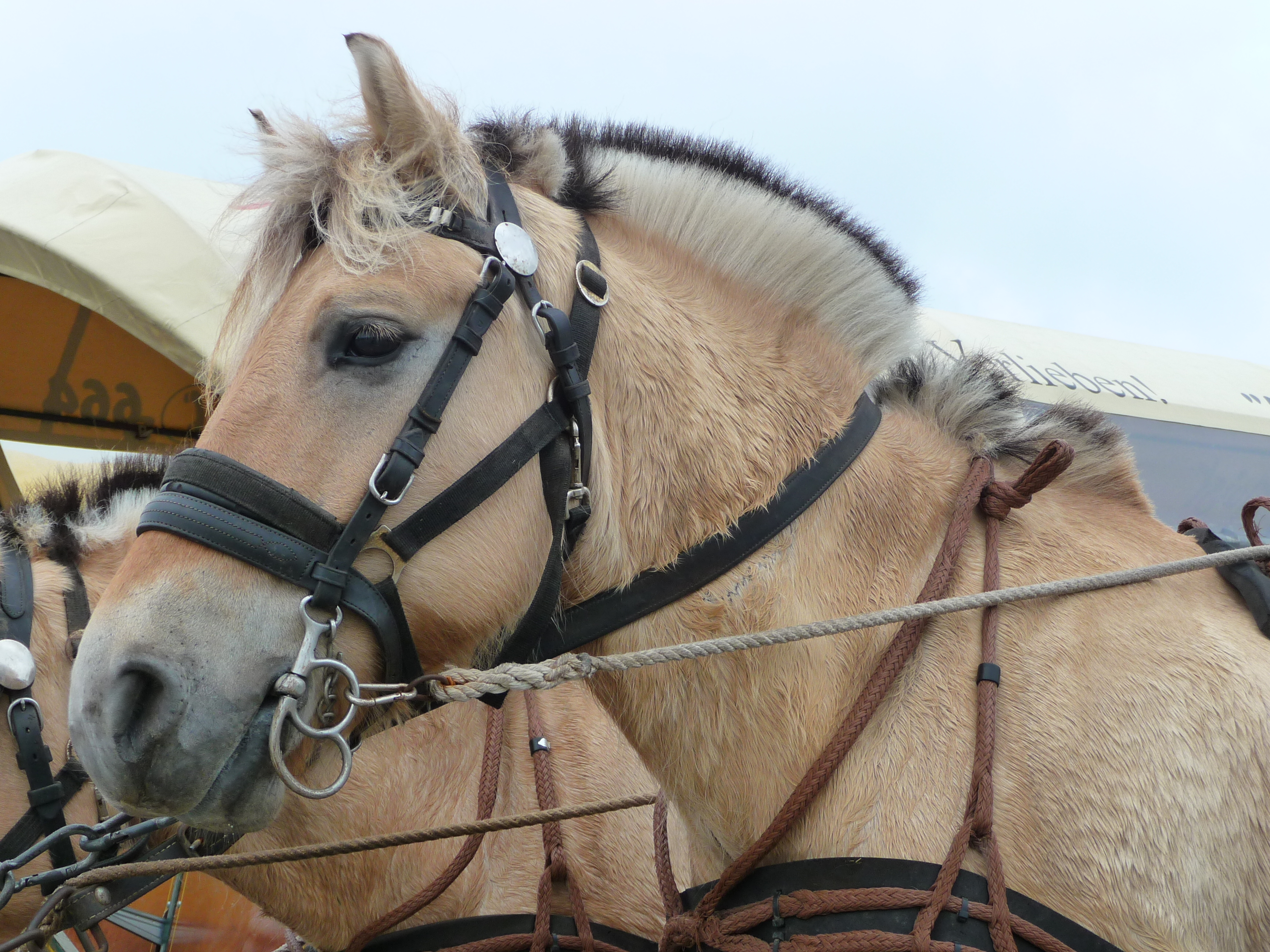 Kopf eines Fjordpferds